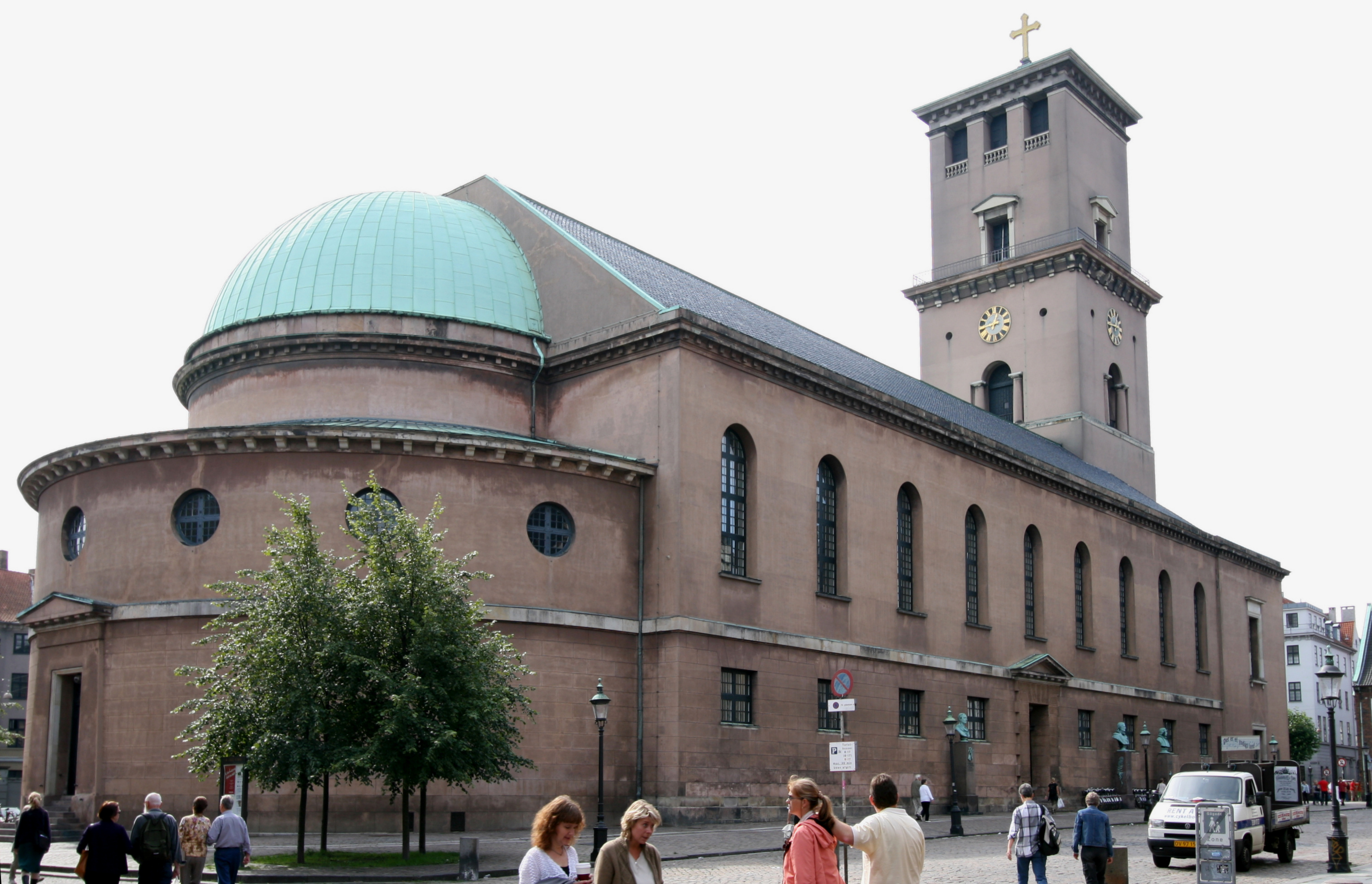 Vor Frue Kirke in Copenhagen, Denmark. The cathedral of Copenhagen. Exterior.